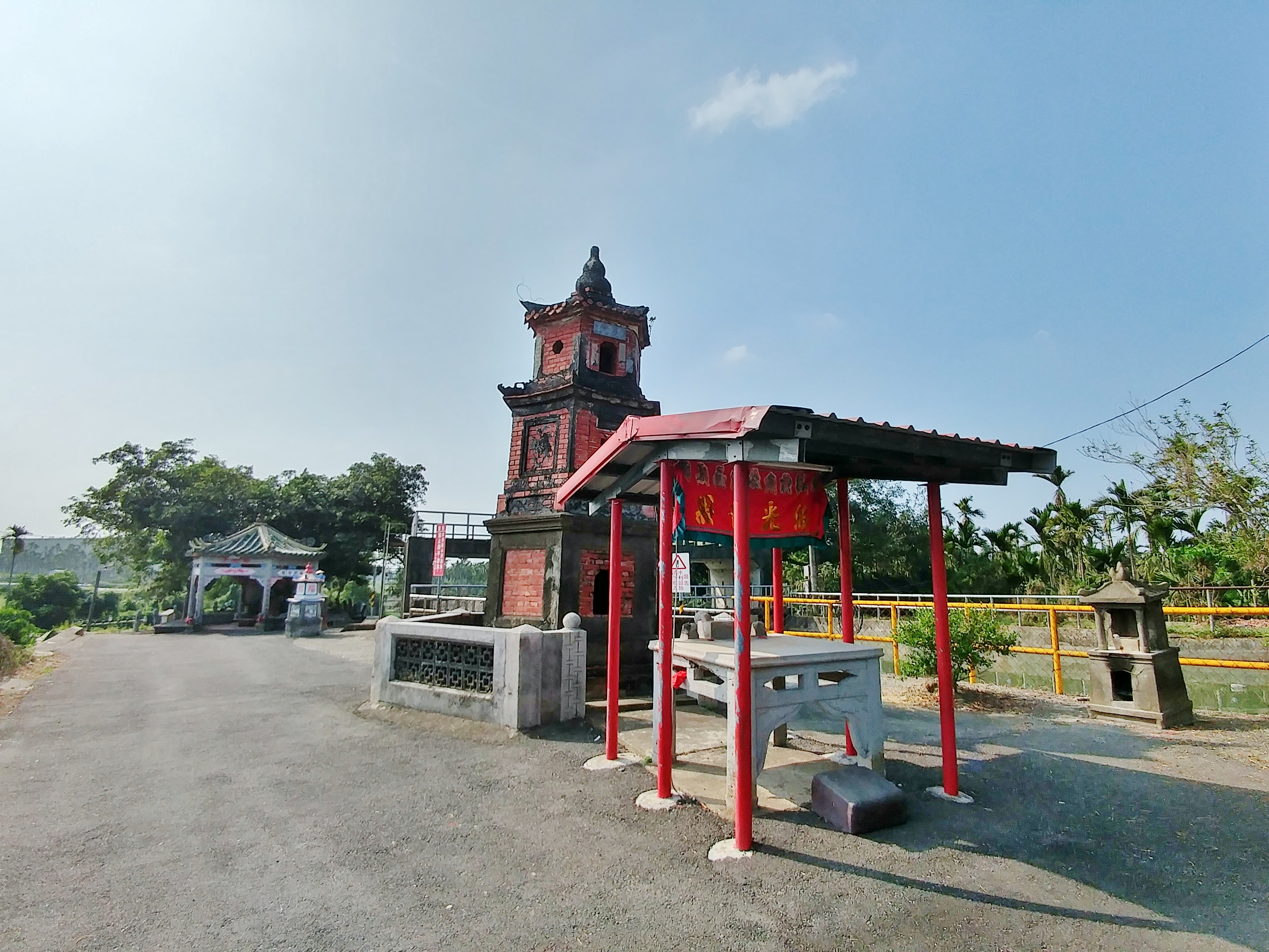 達達港敬字亭